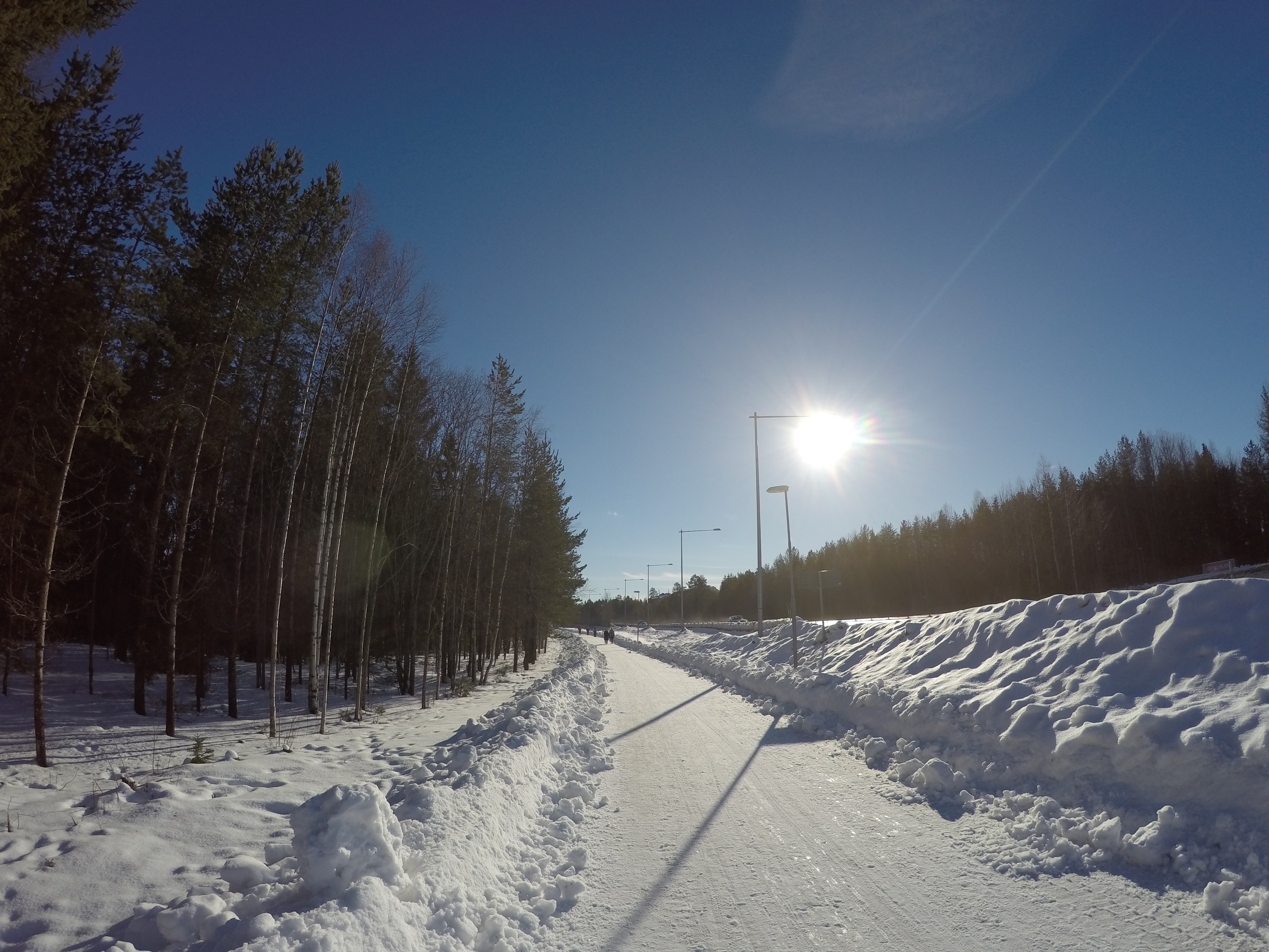 Зима в місті Умео